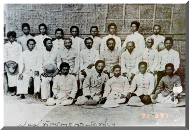 ภาพหมู่ข้าราชการระดับสูง(ระดับผู้ว่าราชการเมืองในภาคอีสาน)